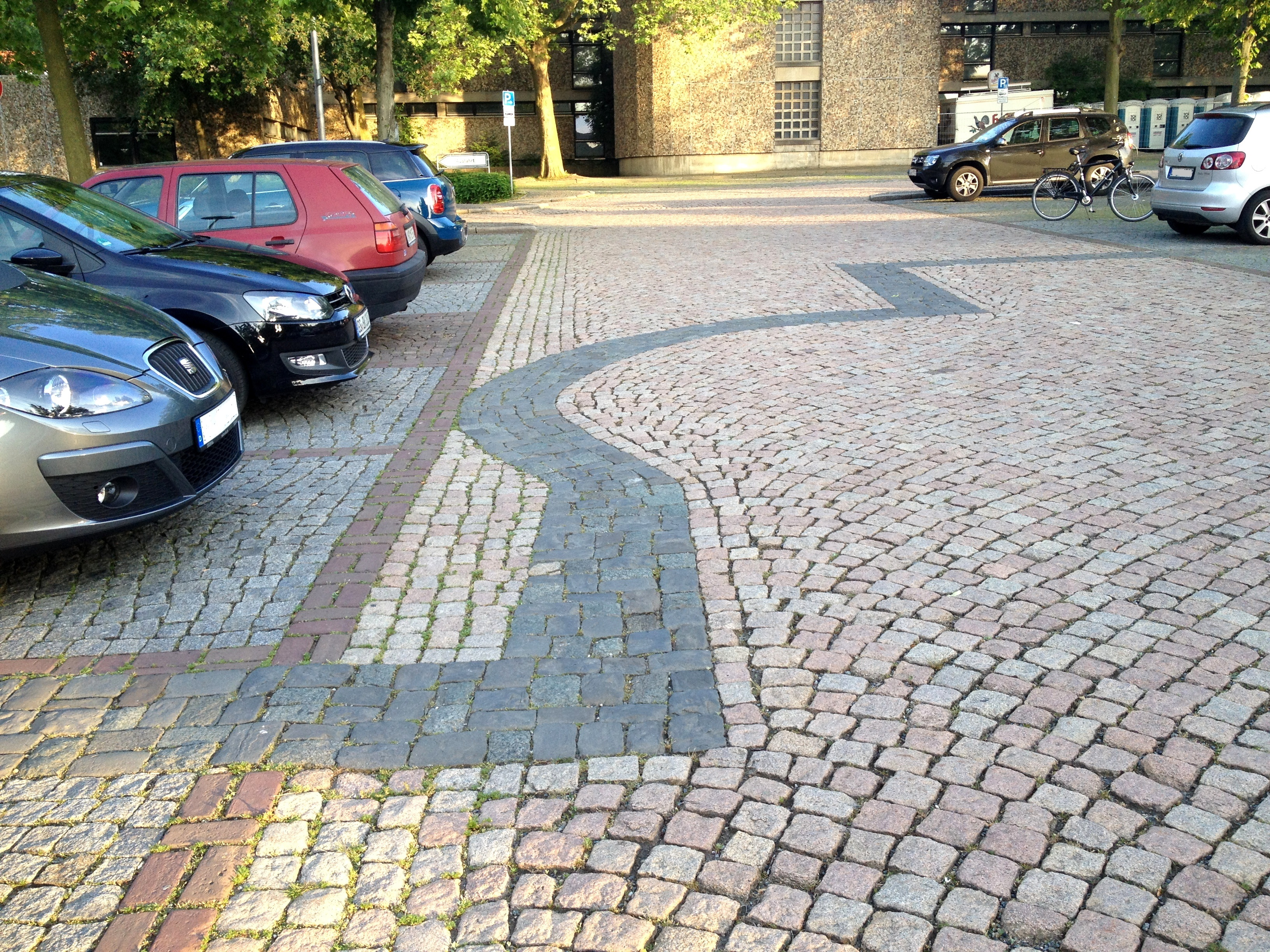 Goslar, Parkplatz Kaiserpfalz, Pflastermarkierung: Grundriss der abgerissenen Stiftskirche ("Goslarer Dom"), Blick aus dem Chorbereich nach Süden, südliche Nebenapsis